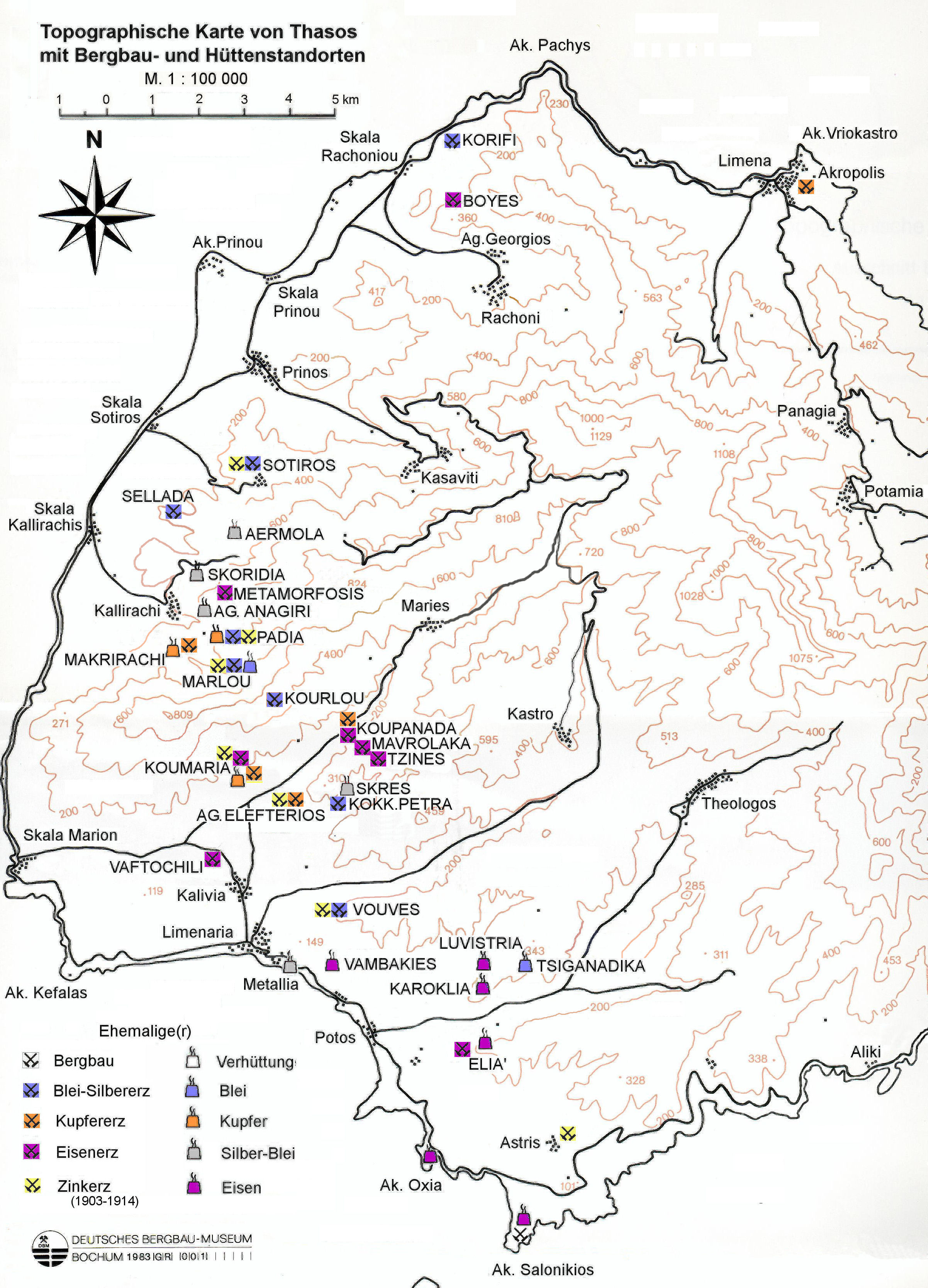 Standorte des Erzabbaus und der Metallgewinnung im Westteil der Insel Thasos